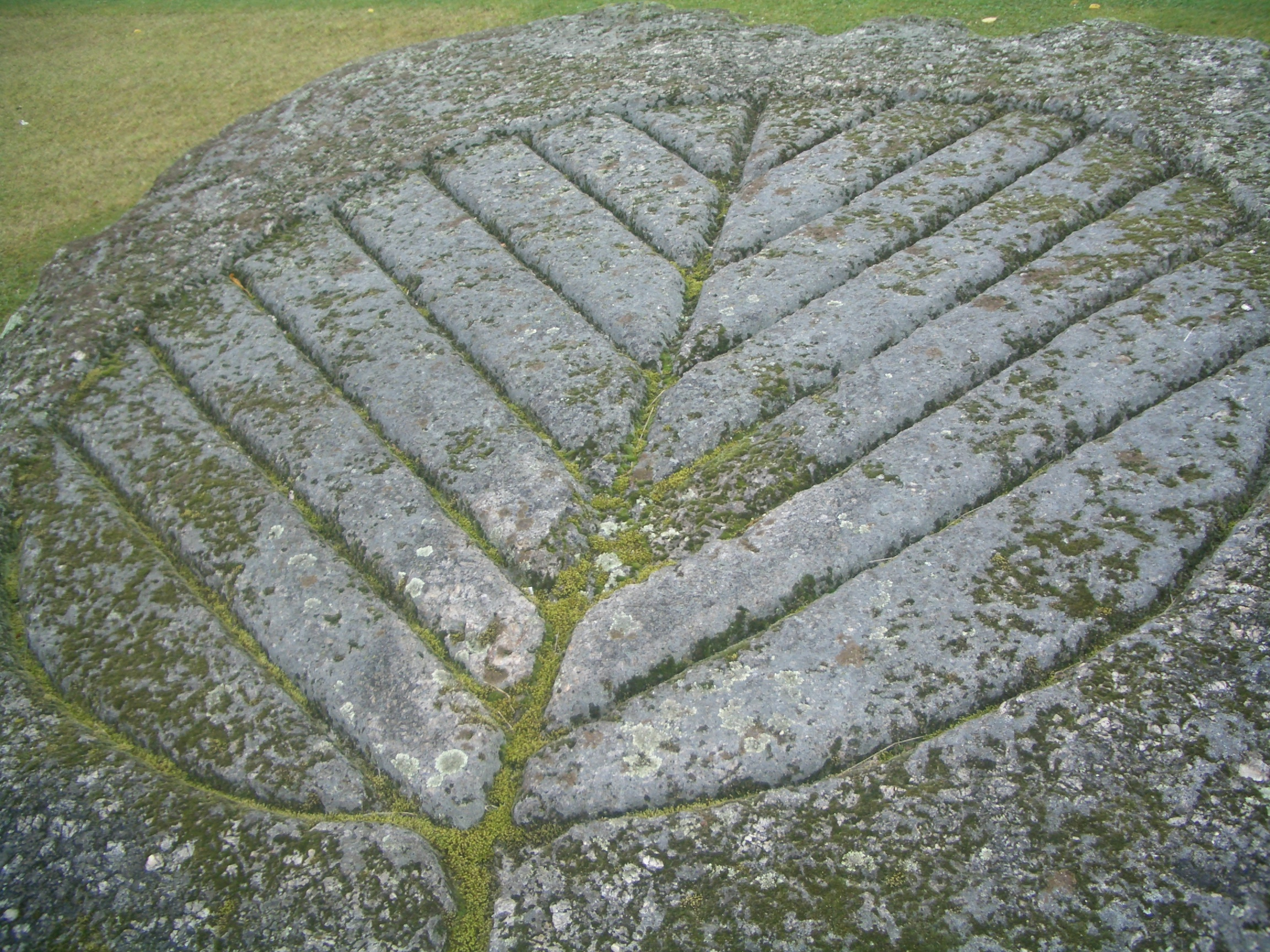 Pechölstein in Hundsberg bei Gutau Object location48° 24′ 18.84″ N, 14° 35′ 27.45″ E This media shows the natural monument in Upper Austria with the ID nd197.